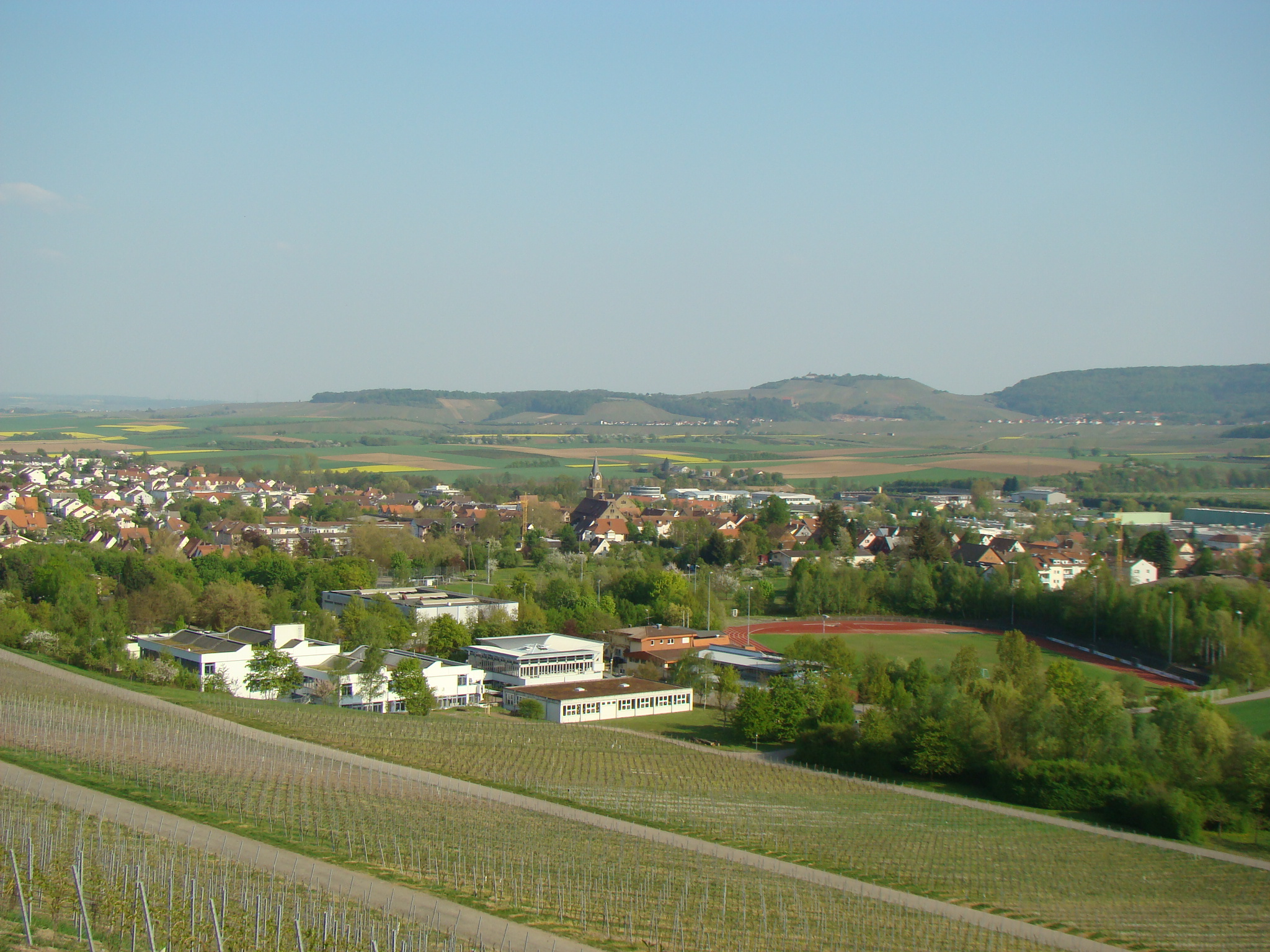 Blick auf Güglingen